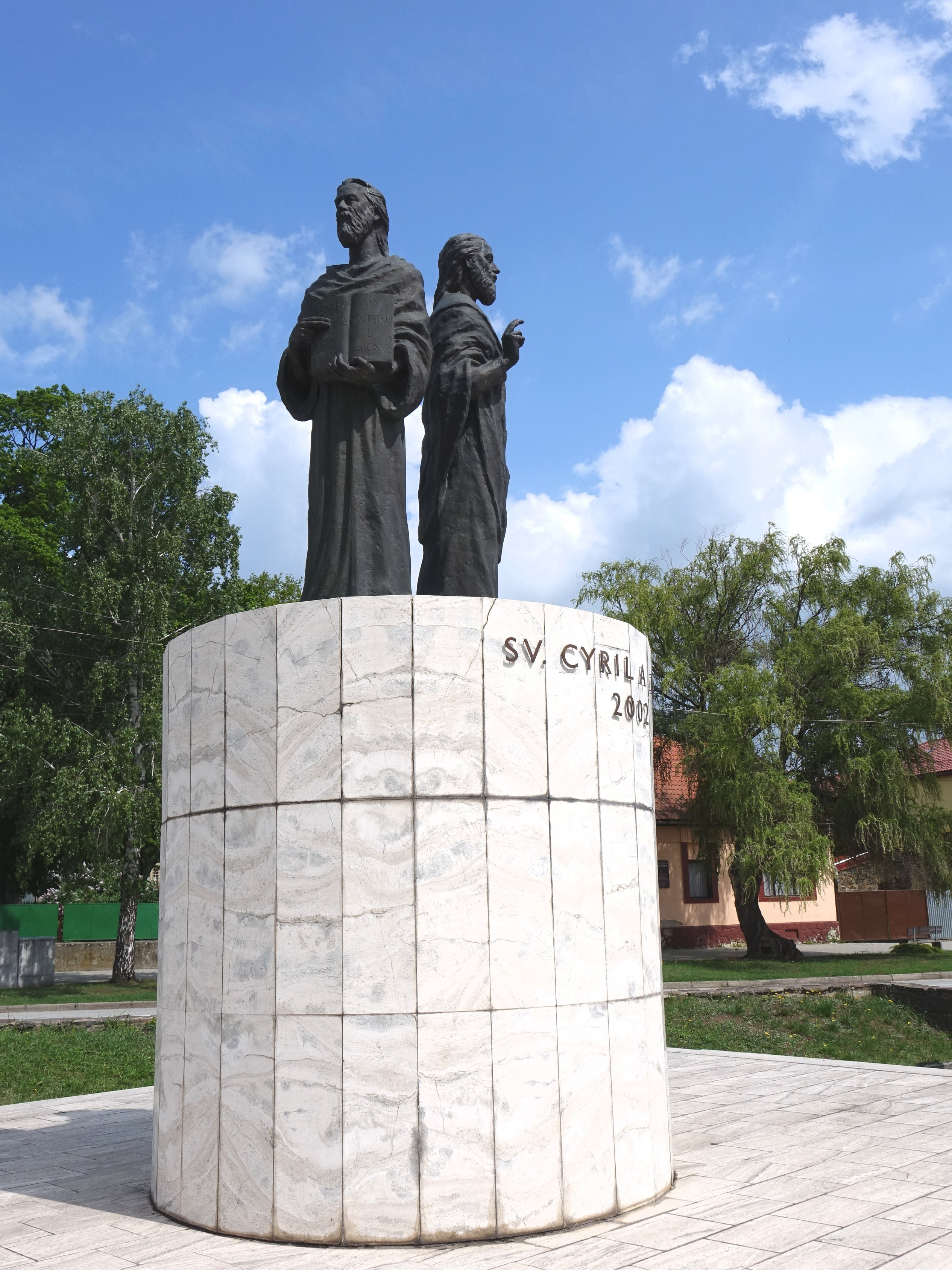 1. máj 2019. Súsošie sv. Cyrila a Metoda, mesto Sečovce. Okres Trebišov, Slovensko.